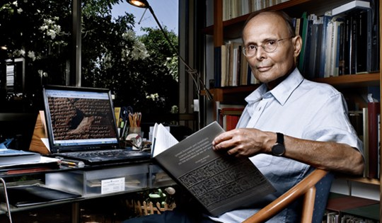 פרופסור למזרח תיכון קדום איתמר זינגר